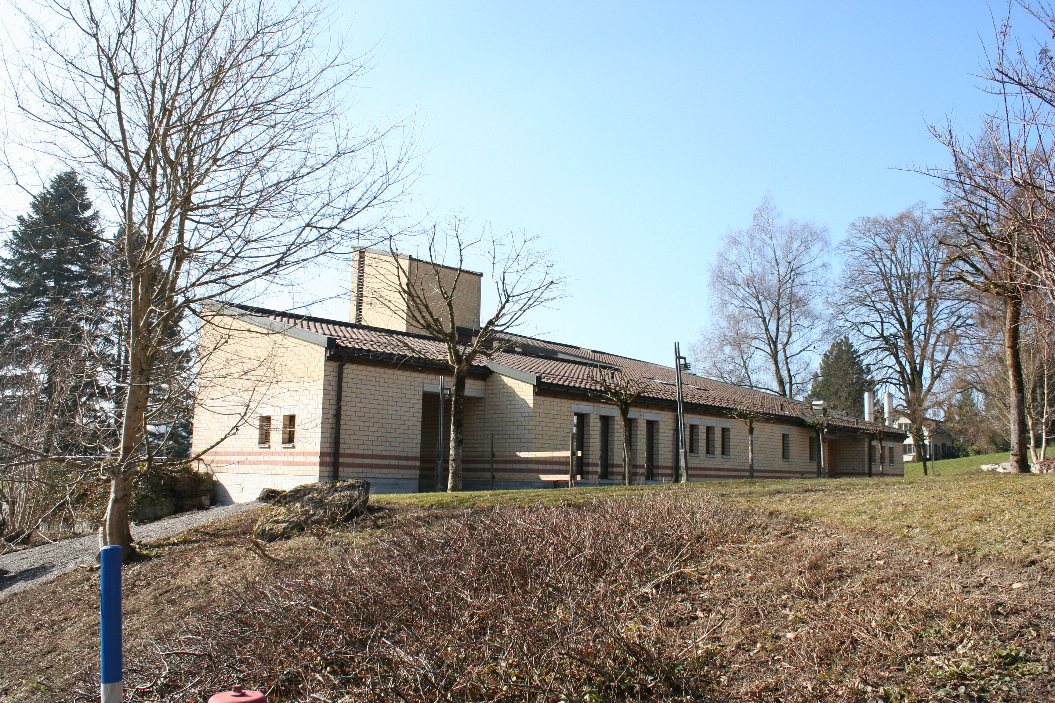 Römisch-katholische Kirche Bruder Klaus Bäretswil